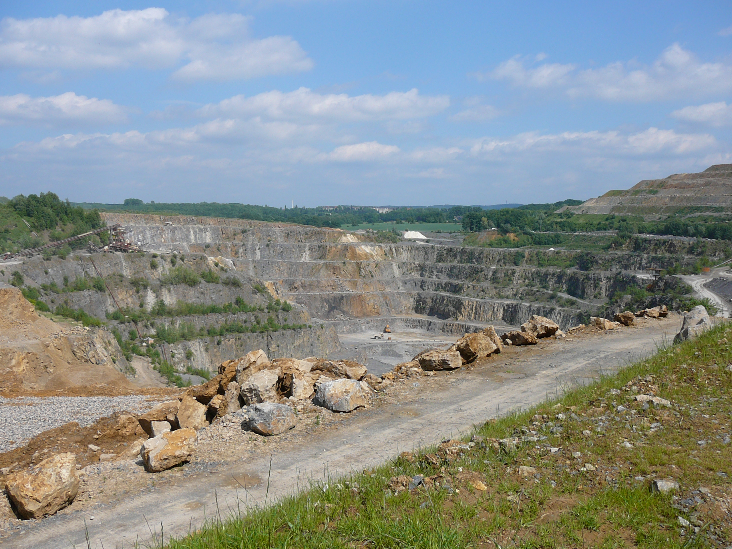 Steinbruch bei Schöller, Wuppertal